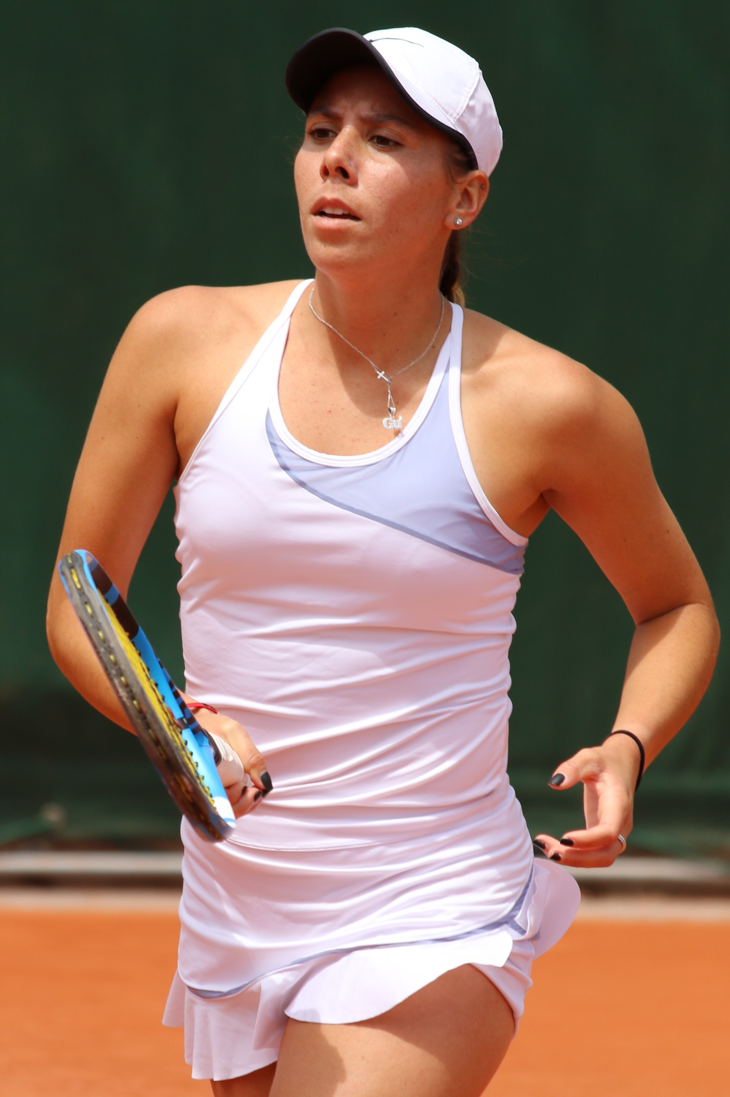 Olmos RG19 (47)